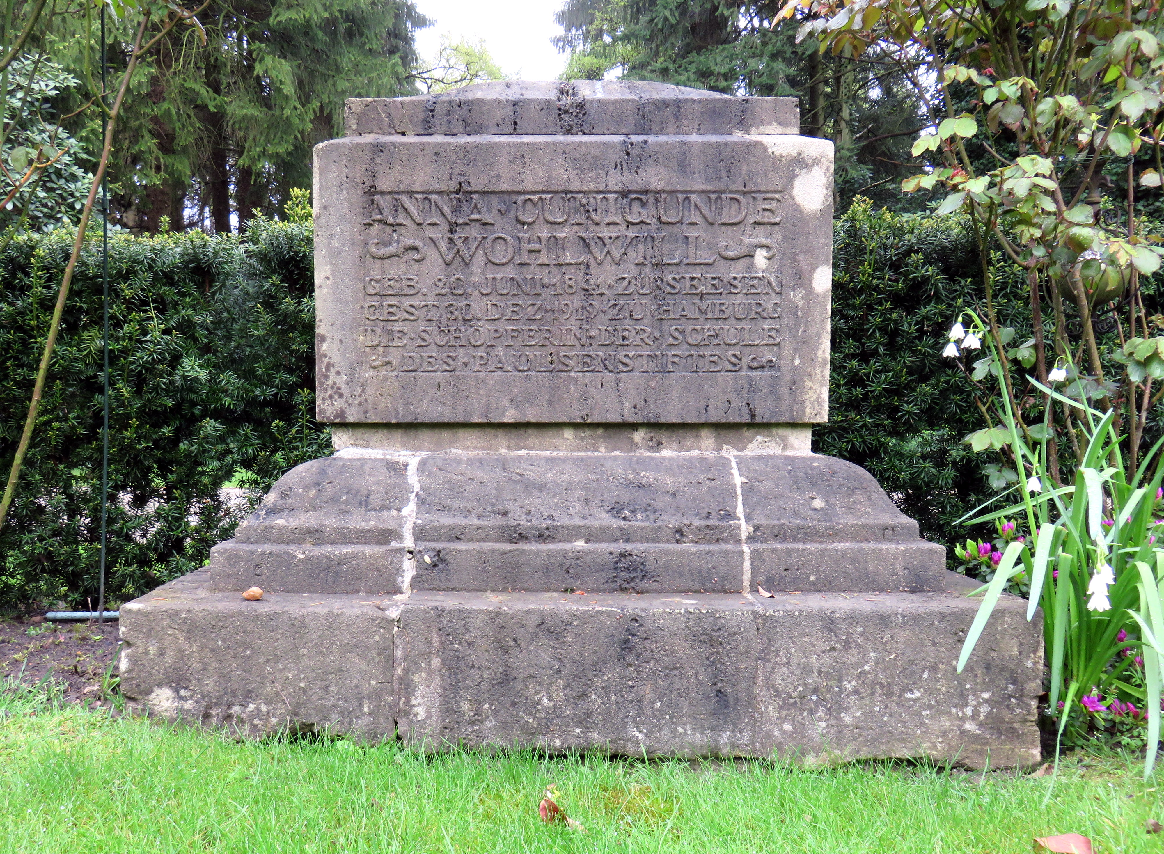 Historischer Grabstein der eutschen Pädagogin Anna Cunigunde Wohlwill im Bereich des Gartens der Frauen auf dem Ohlsdorfer Friedhof in Hamburg-Ohlsdorf.